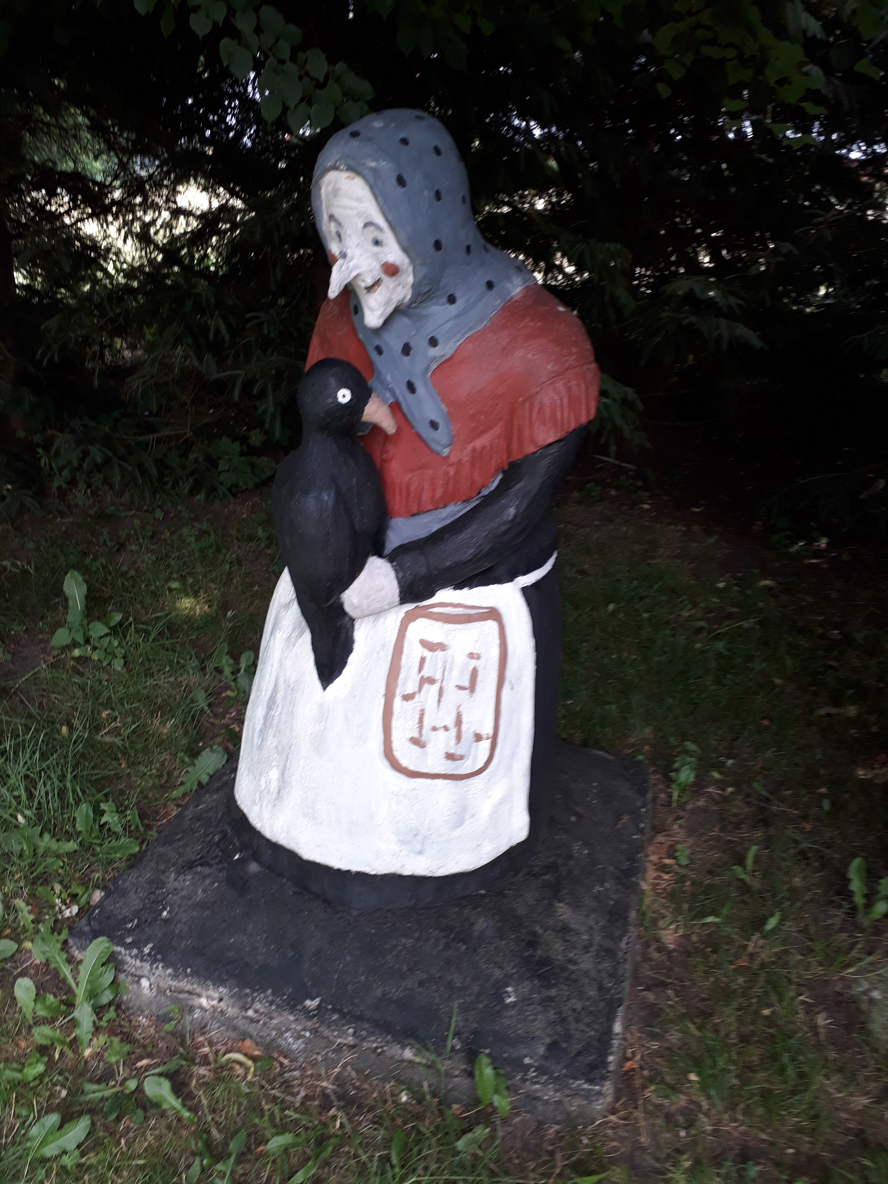 Hexenskulptur in Kakerbeck, Ahlerstedt zu Gedenken einer Hexensage.